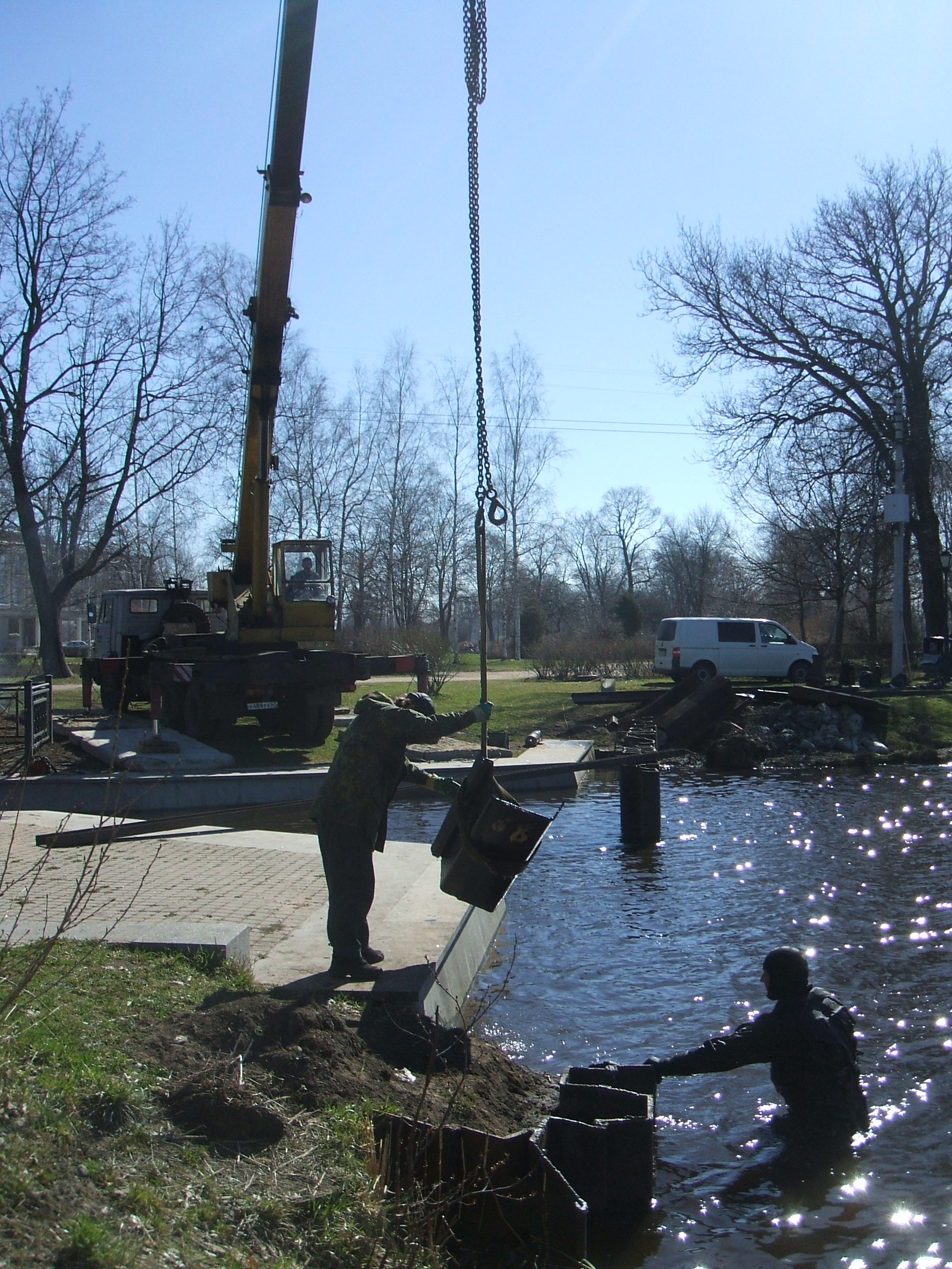 Сестрорецк СПб. Плотина заводской гидроэлектростанции. Разборка шпунтовой перемычки, установленной в 2005 году перед плотиной